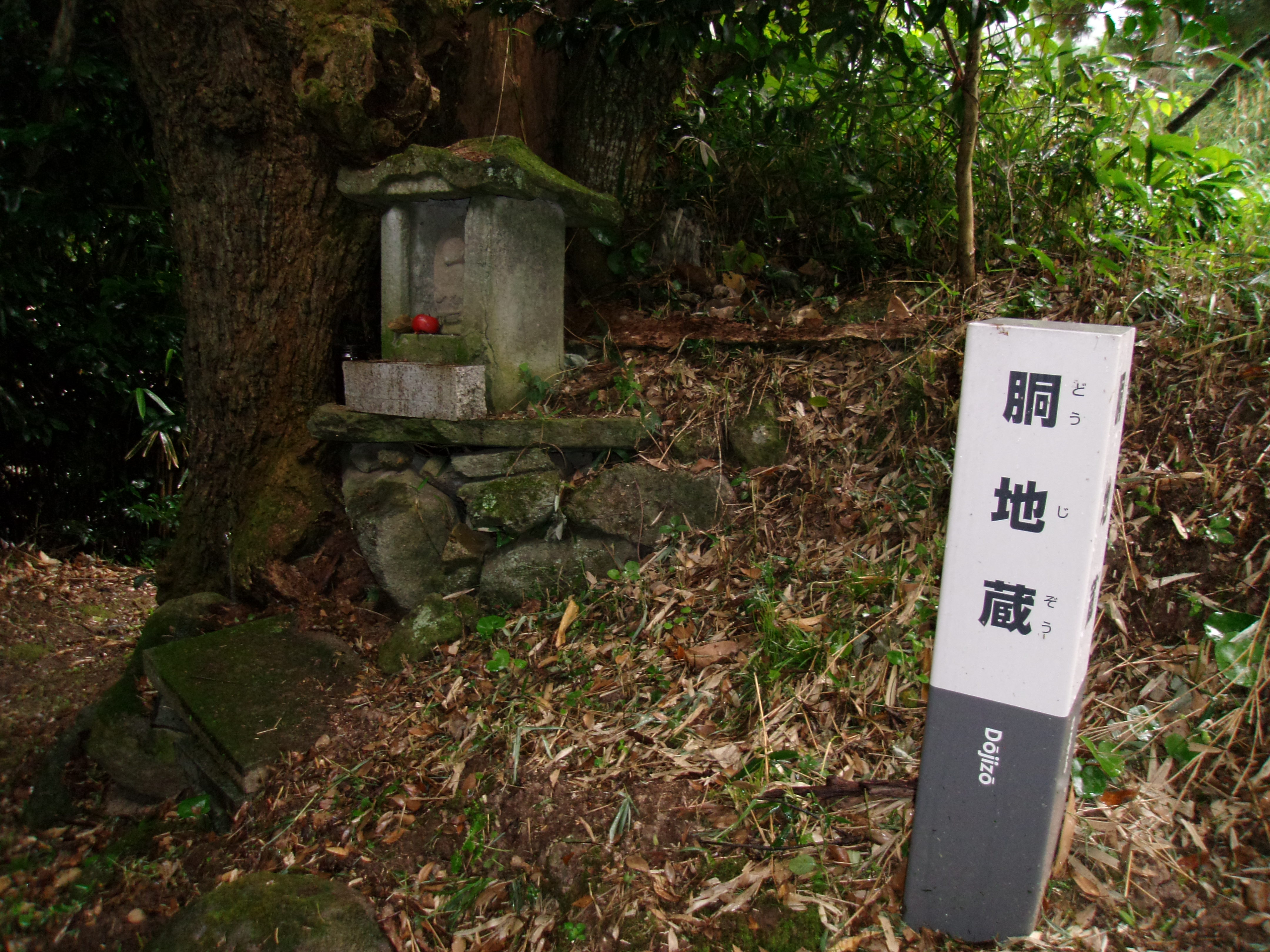 世界遺産「石見銀山」の構成資産である銀山街道鞆ヶ浦道 胴地蔵